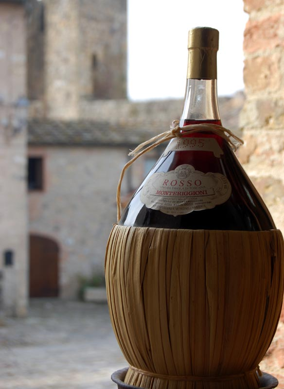 Italian vino rosso da tavola in a traditional straw-covered fiasco